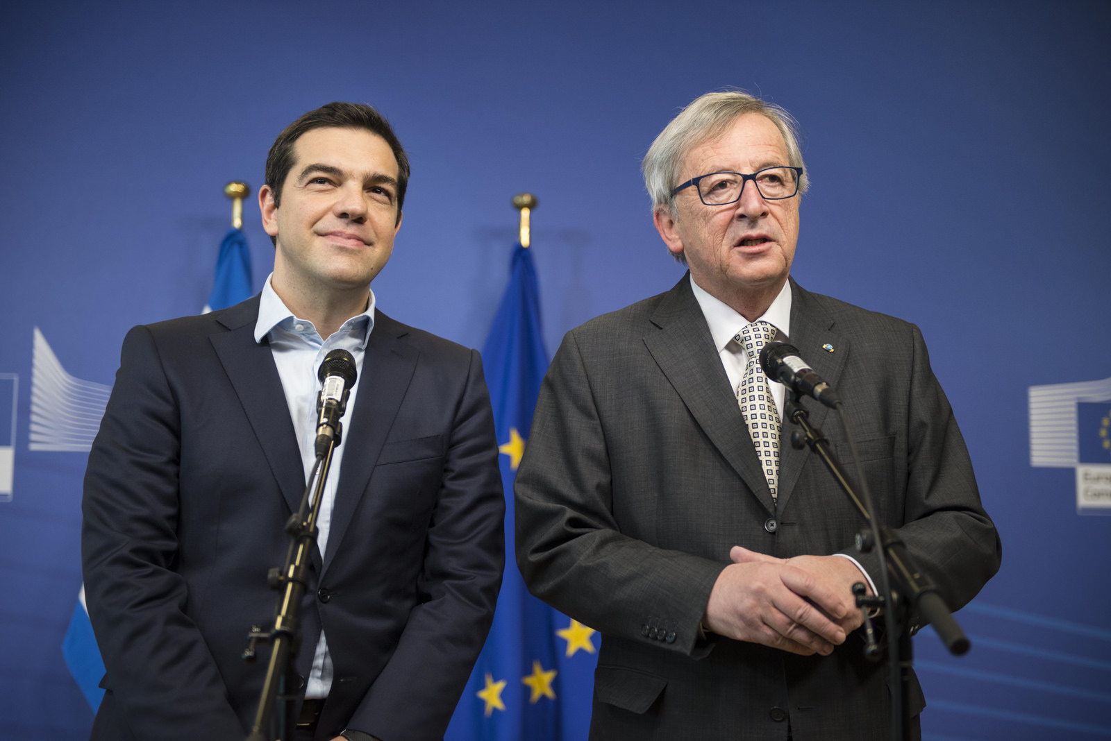 Tsipras-Junker 05